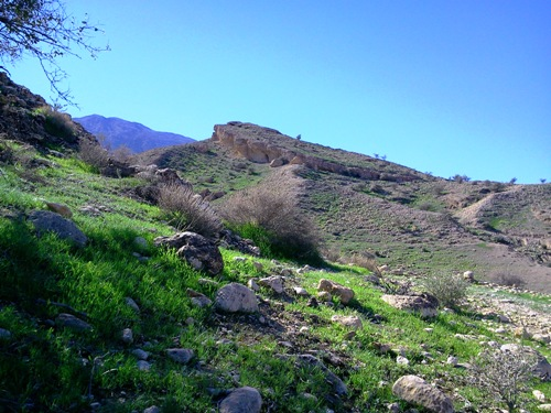 قلات گبری مربوط به زندگی گبرنشینان قدیم